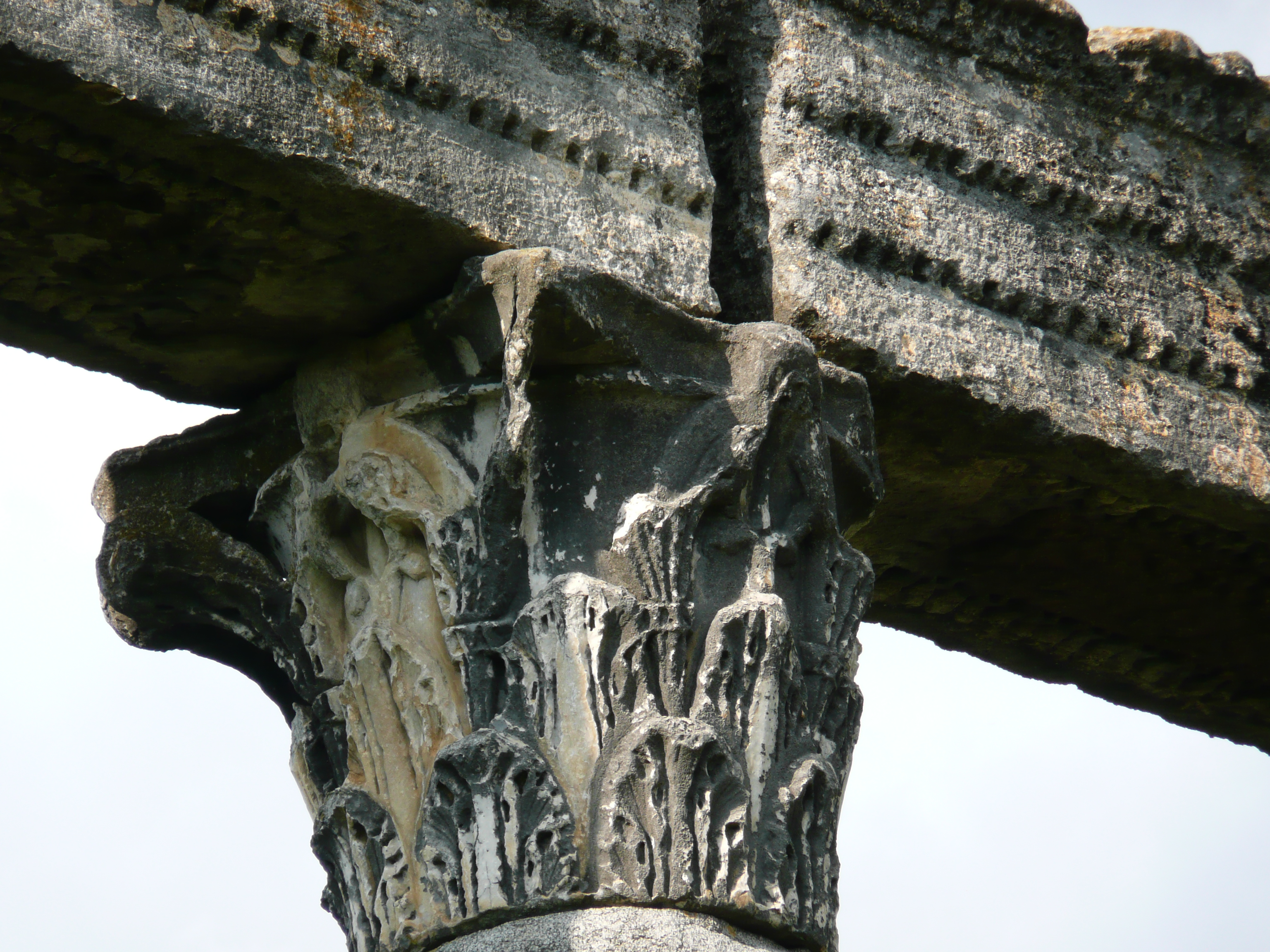 Colonia Julia Augusta Apollinarium Reiorum